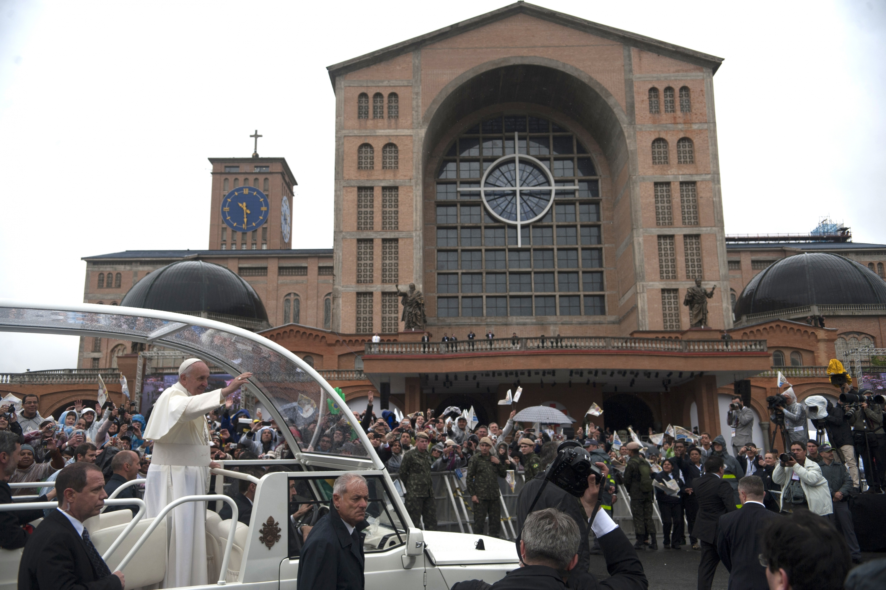 Papa Francisco chega à Basílica de Aparecida_24/7/13